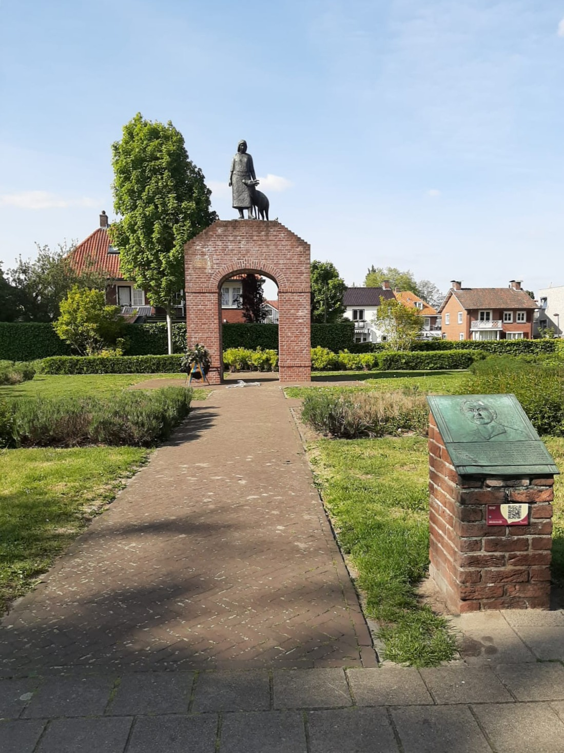 Op de foto is het monument voor Tante Riek te zien. Op de voorgrond staat de plaquette met een portret van Tante Riek. Het beeld op de achtergrond is een eerbetoon aan alle Nederlandse vrouwen in het verzet. Het beeld staat aan het Mevrouw Kuipers-Rietbergplein ter Winterswijk.